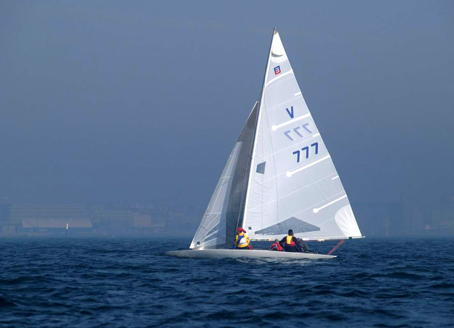 E Scow, purjehduskilpailu, Suomen Urheiluveneliitto, Helsinki